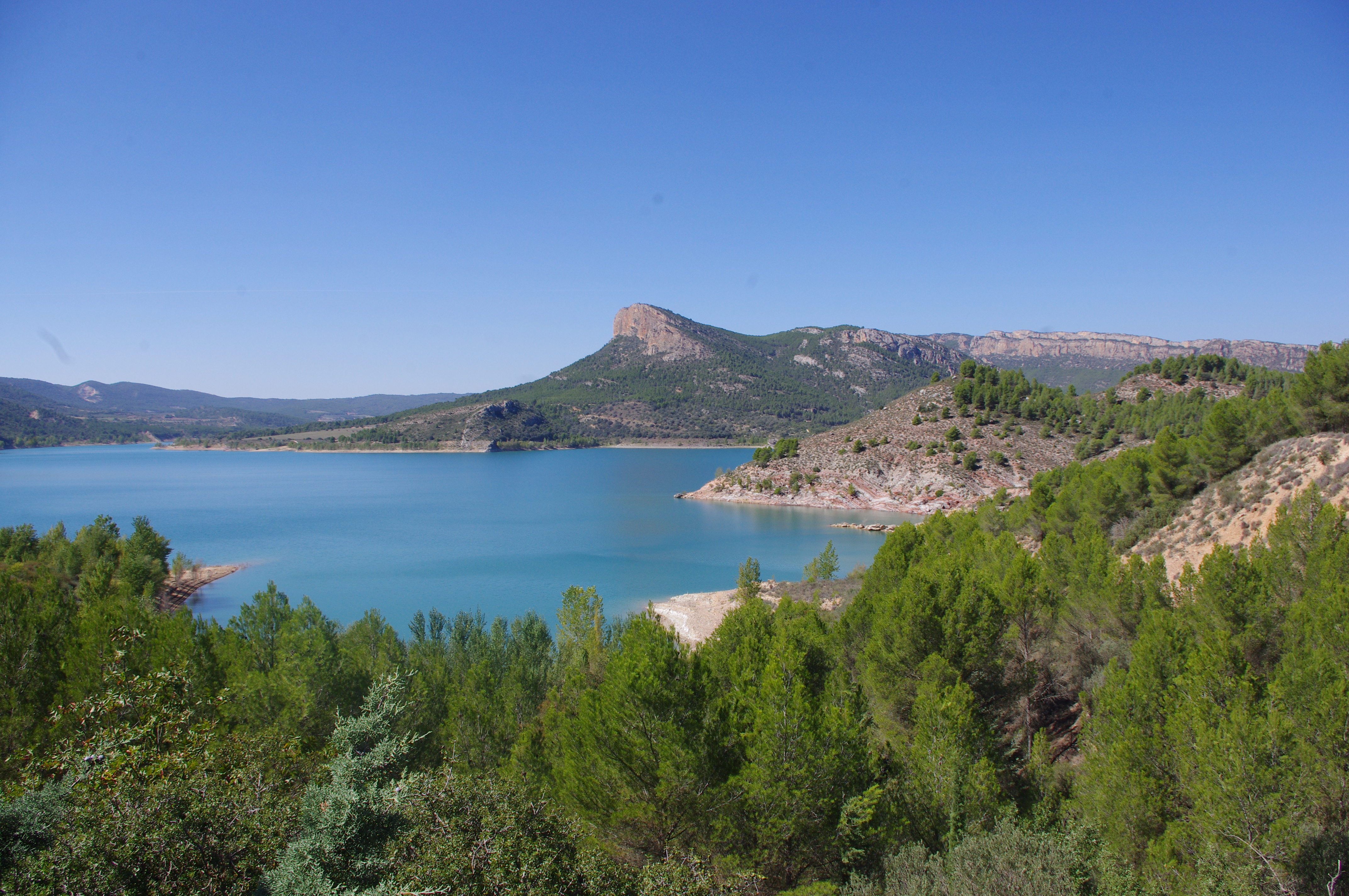 Pantà de Santa Anna, a la Noguera Ribagorçana, vist des de l'antic nucli de Boix a Ivars de Noguera.